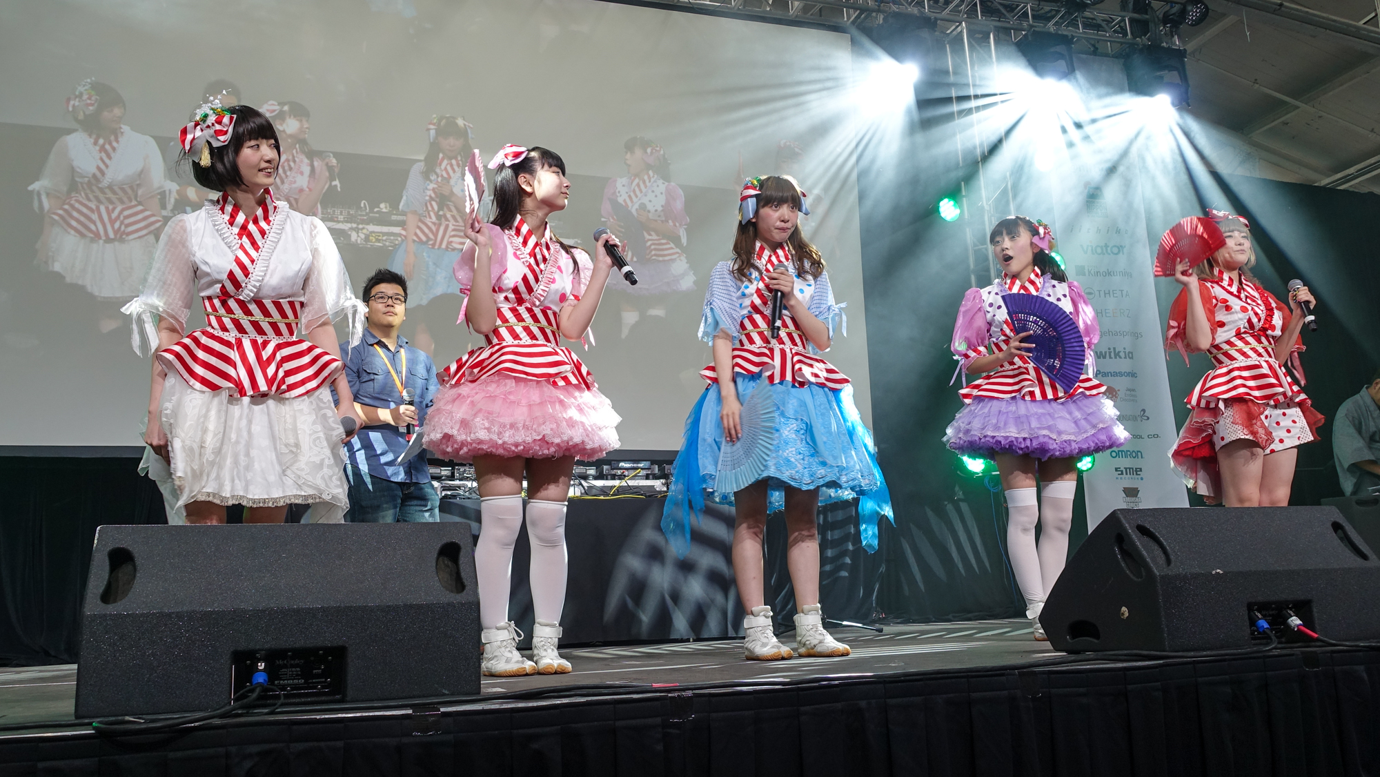 Musubizm at J-Pop Summit 2015